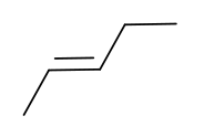 formule simplifiée du Trans-2-pentène